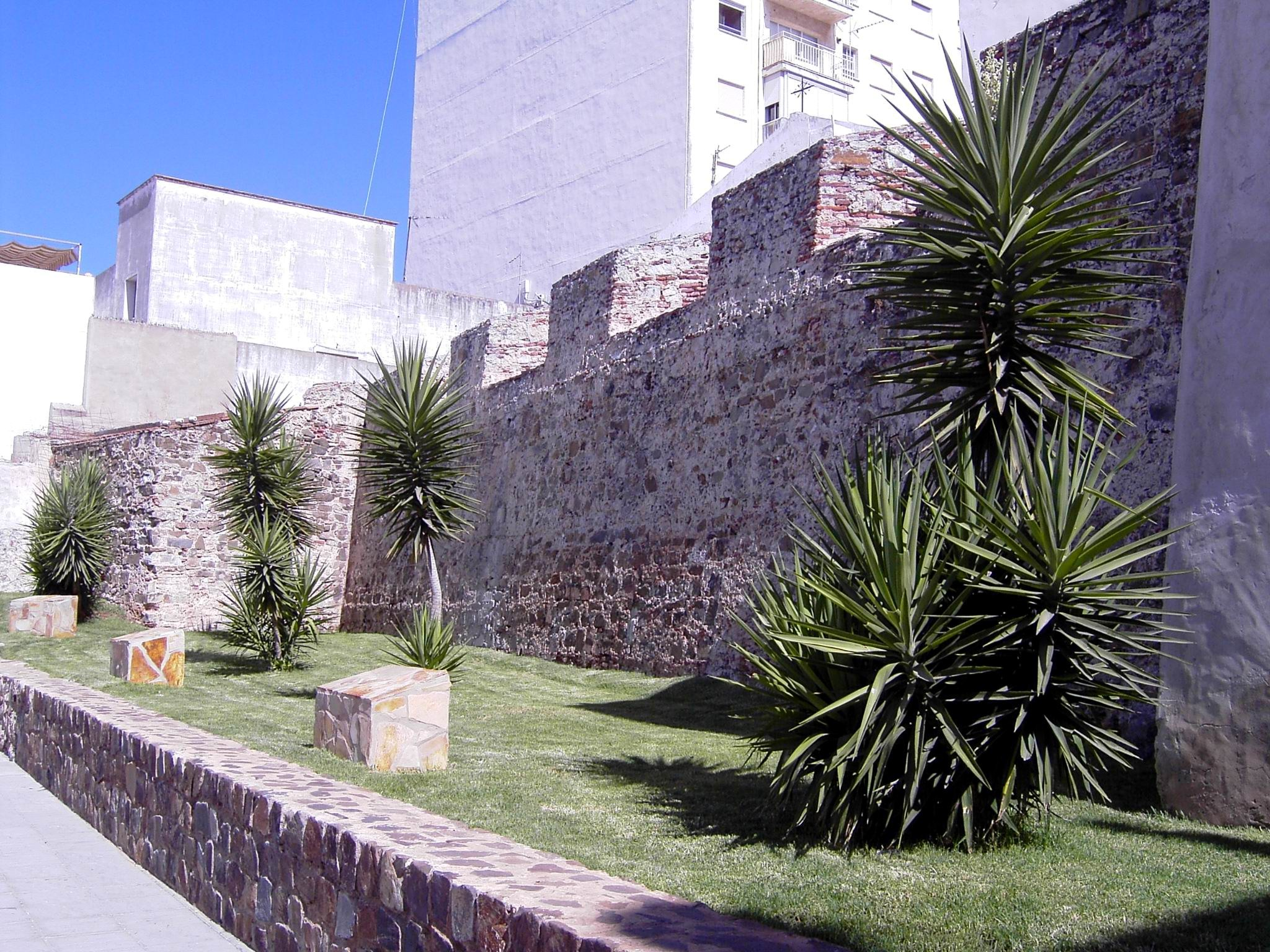 Baluarte de las Angustias. Ayamonte (Huelva)